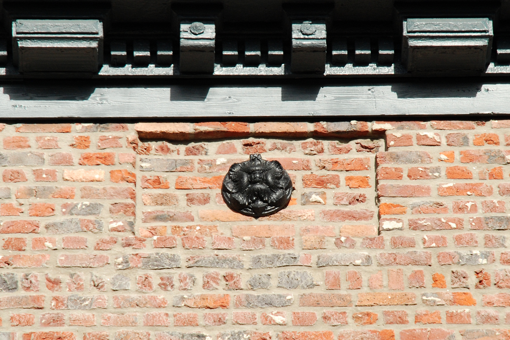 Cache-boulin